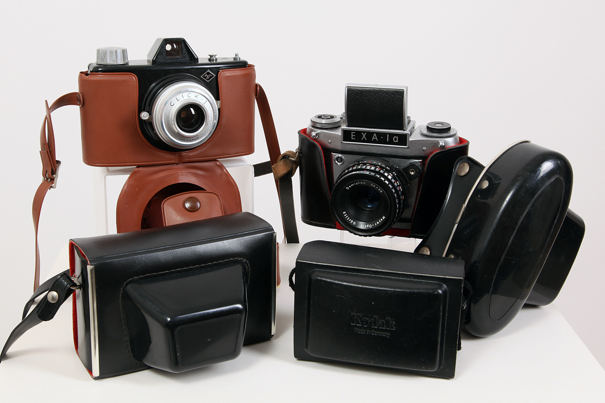 Verschiedene analoge Fotoapparate mit Bereitschaftstaschen: hinten, Taschen geöffnet: Agfa Click I, EXA 1a vorne, Taschen geschlossen: Pentacon Electra 2, Kodak Instamatic 25